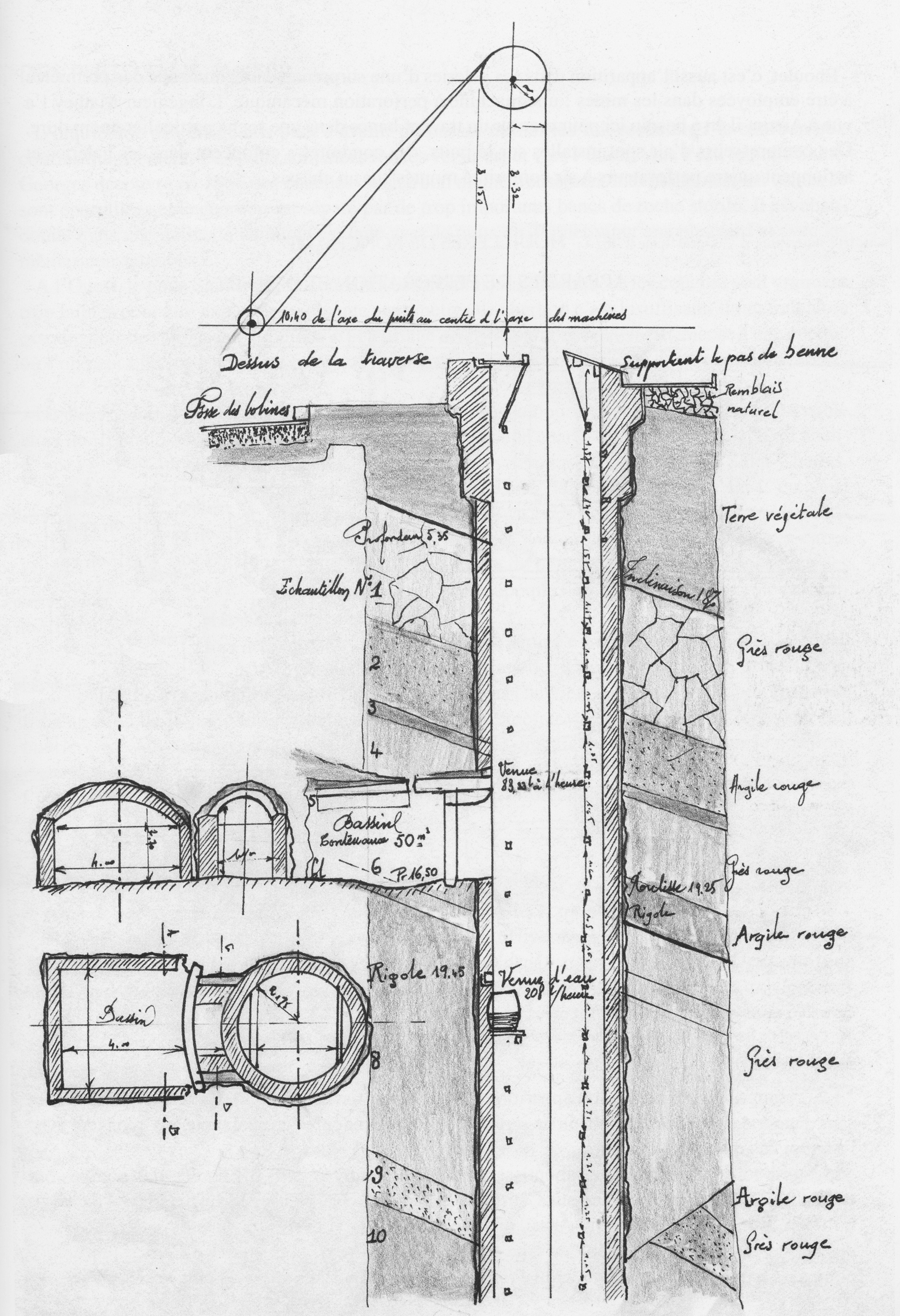 Plan en coupe du puits n° 10 de Ronchamp.